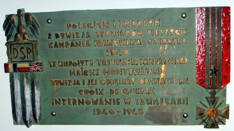 Tablica w kościele św. Andrzeja Boboli w Londynie